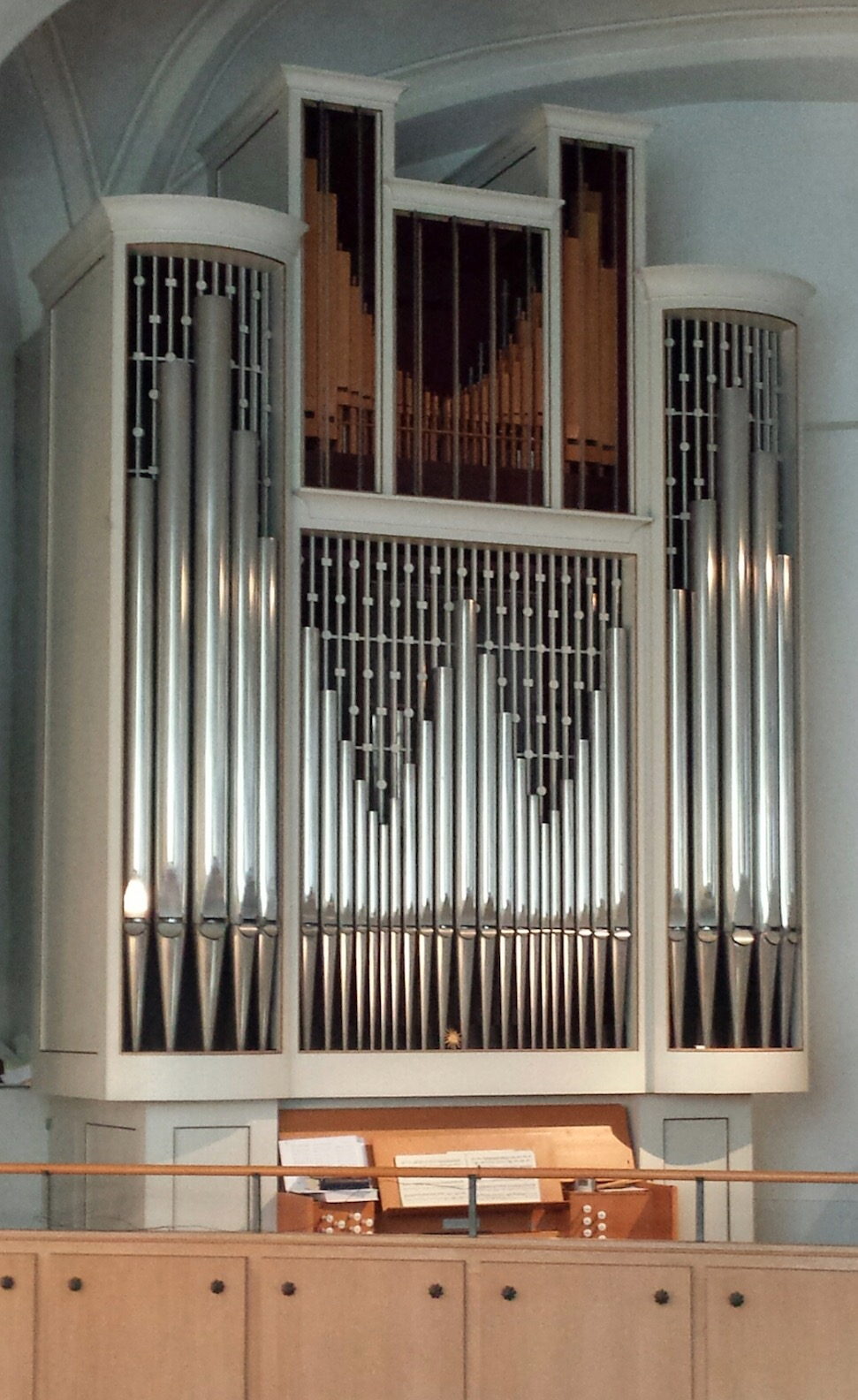 Beckerath-Orgel der Diakoniekirche Bad Kreuznach